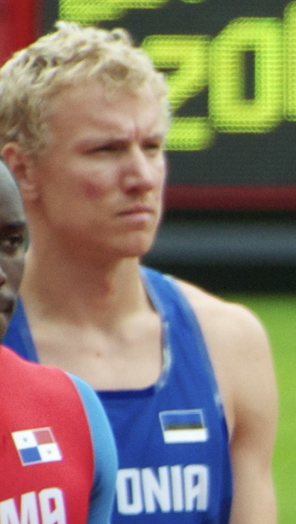 Warren Weir